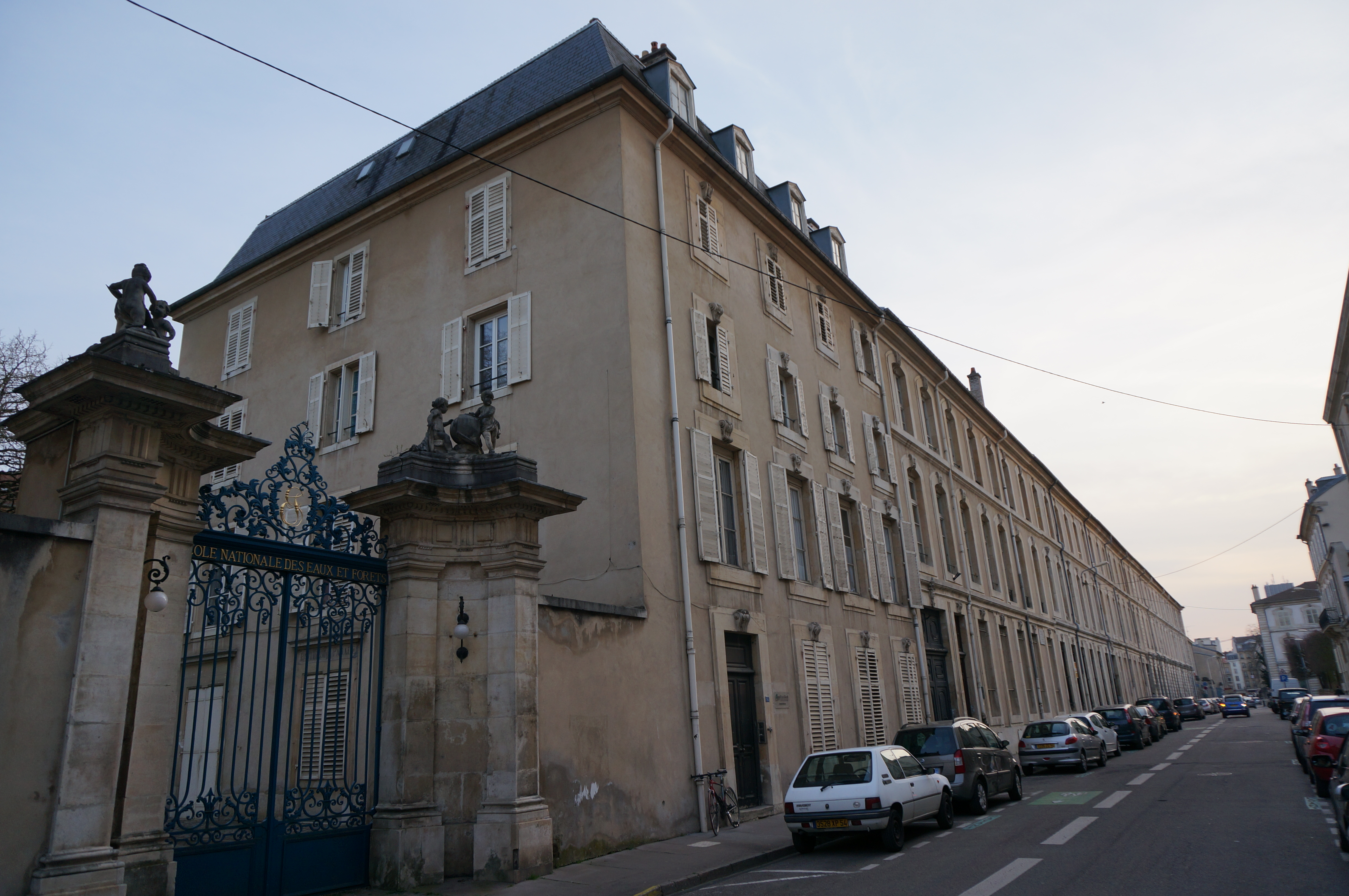 rue Girardet (Nancy), ancienne école ONF actuellement Agro-paris-tech.